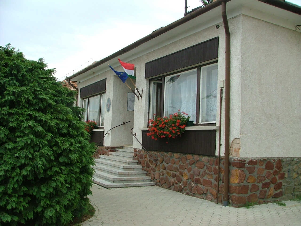 Lövői községháza